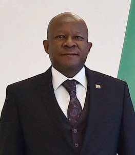 Prezident İlham Əliyev Cənubi Afrika Respublikasının Azərbaycana təyin olunmuş fövqəladə və səlahiyyətli səfiri Pule İsaak Malefanenin etimadnaməsini qəbul edərkən